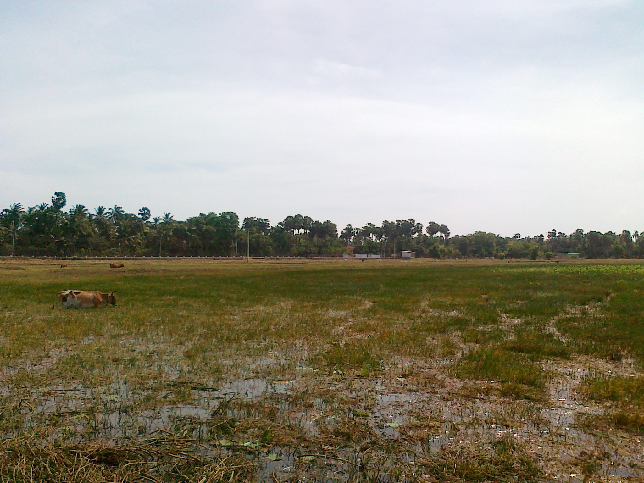 கச்சாய் குள வயலவெளி